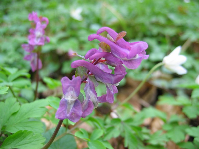 violette Blüte des Hohlen Lerchensporns Corydalis cava, Pölchow bei Rostock